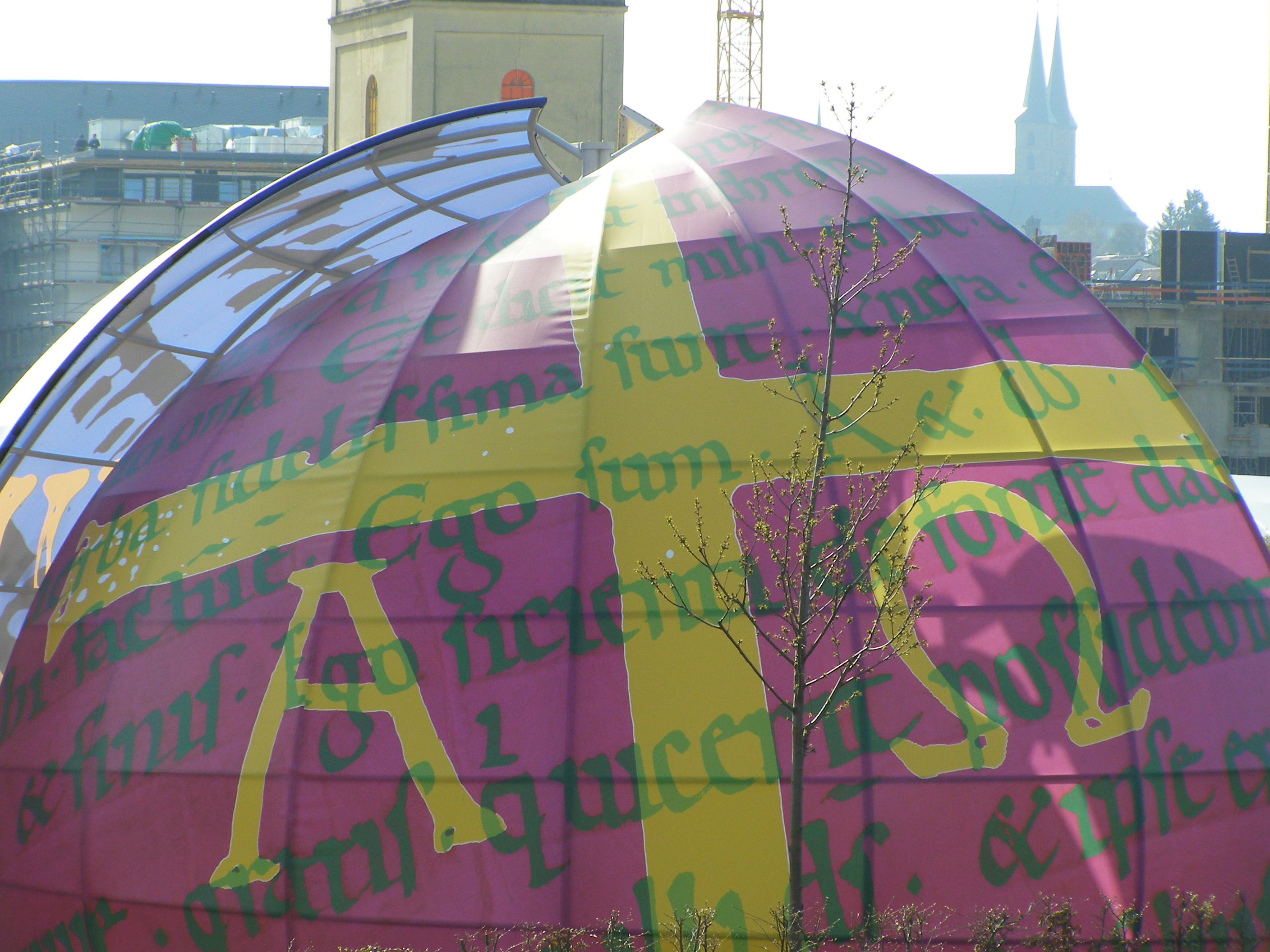 Zelt der Religionen auf der Landesgartenschau 2012, christliche Seite